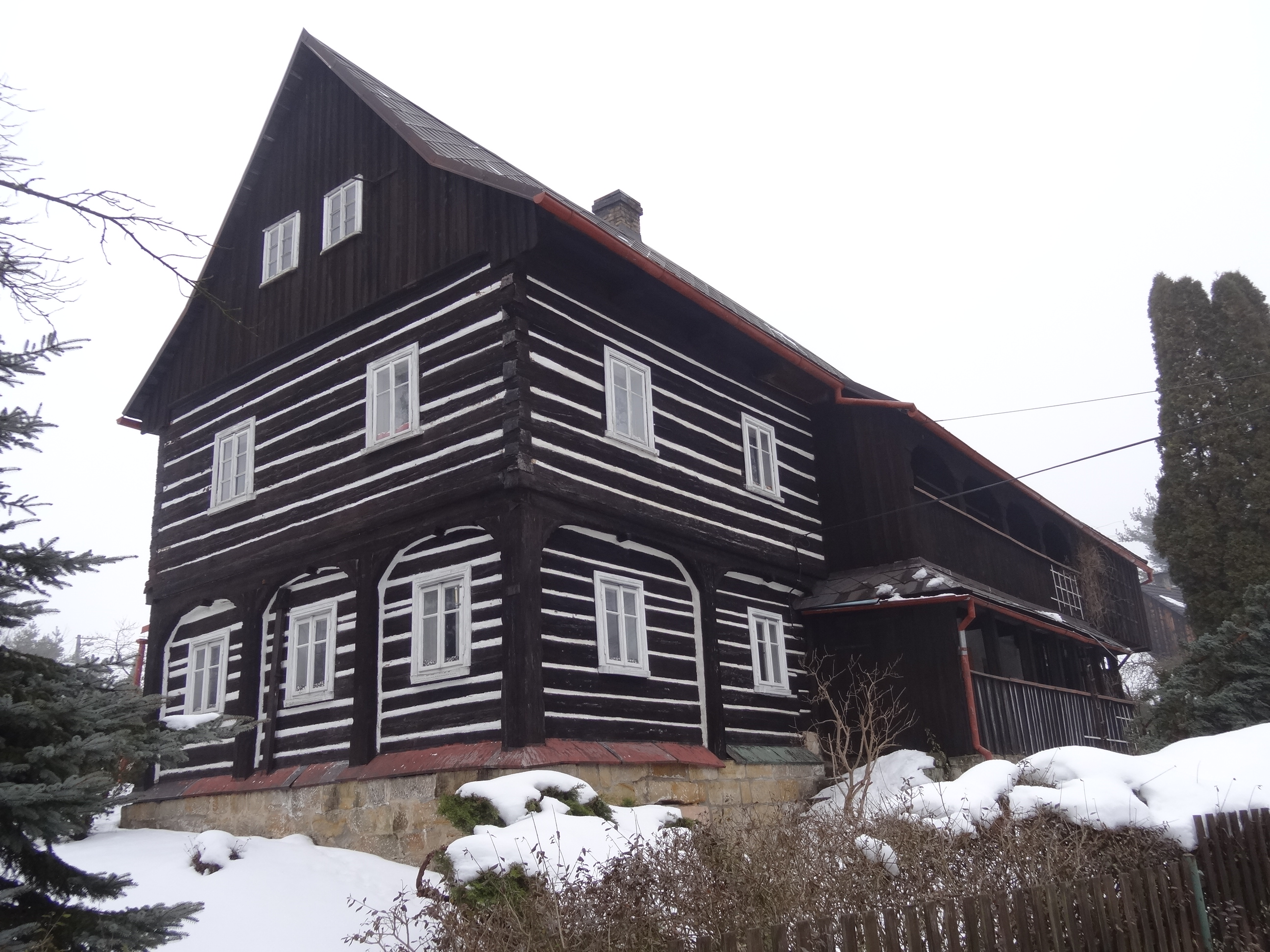 Dům čp. 46, Kunratice 46, Kunratice (okres Děčín).